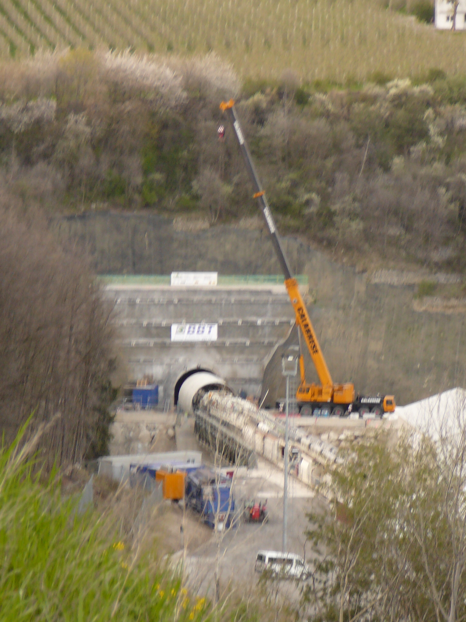 L'ingresso della macchina perforatrice nel tunnel di base del Brennero (BBT) presso Aica.